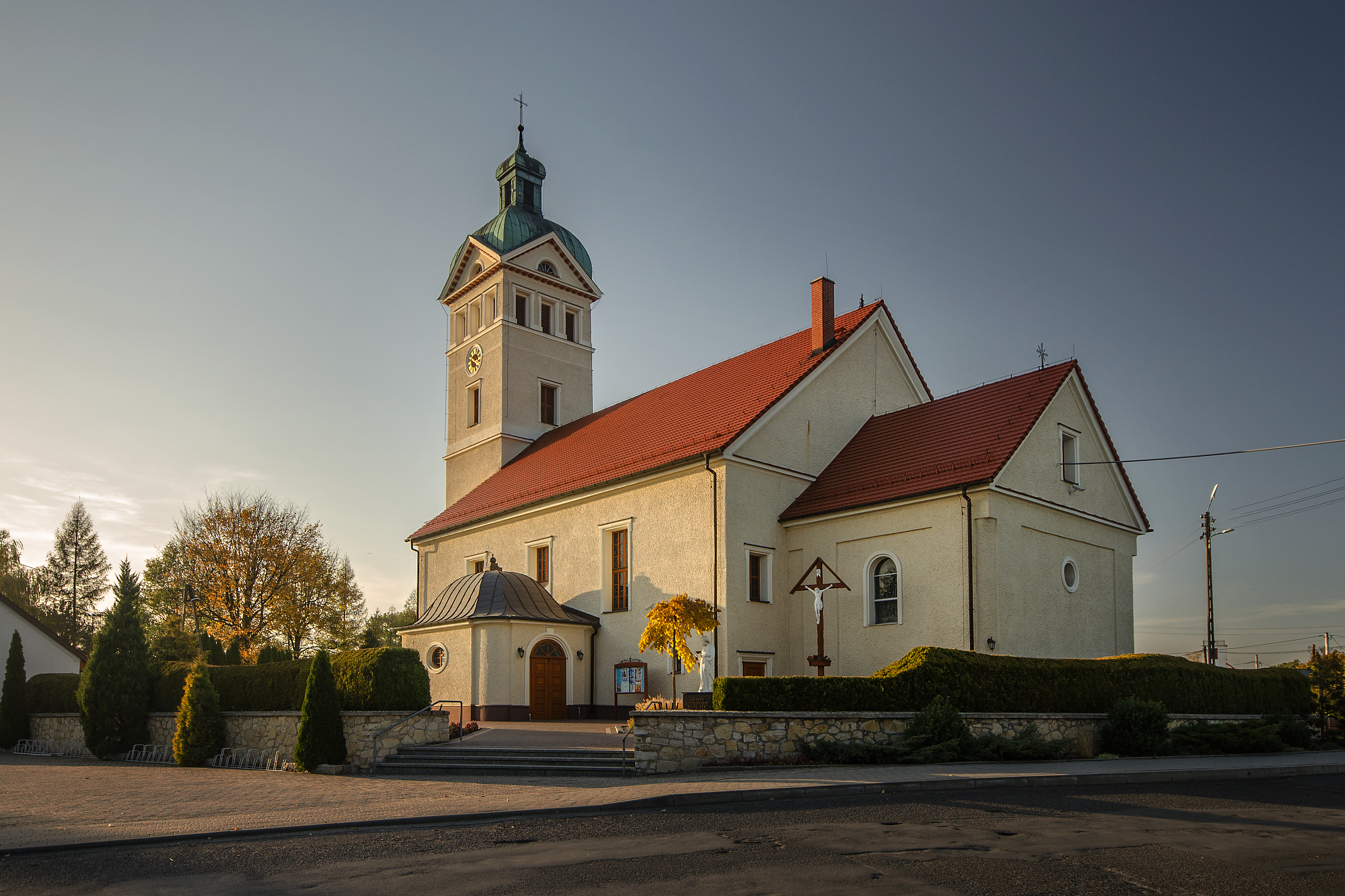 Jełowa, kościół par. p.w. św. Bartłomieja, 1751, 1842